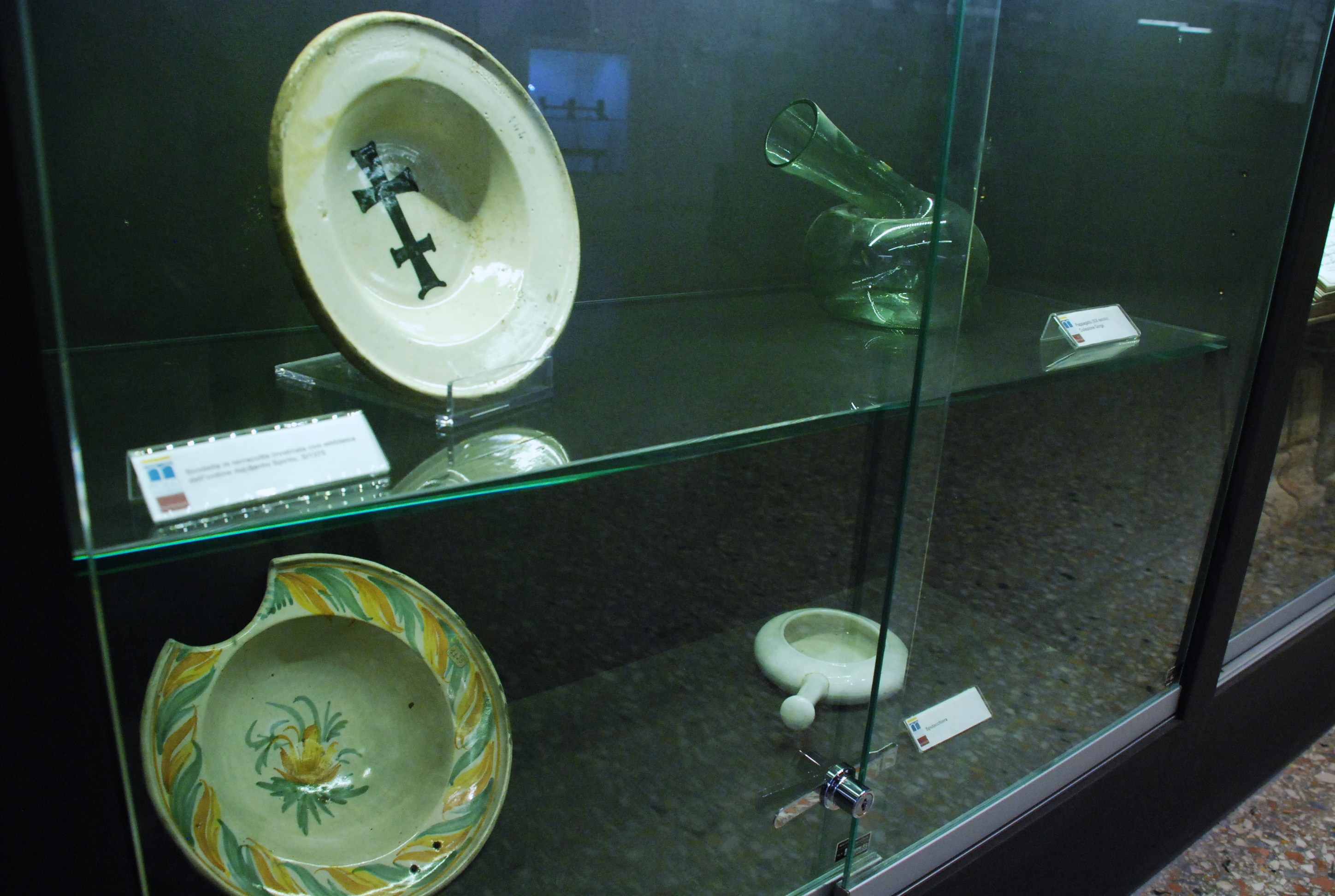 Piatto da barbiere per salasso e altri pezzi della collezione Gorga